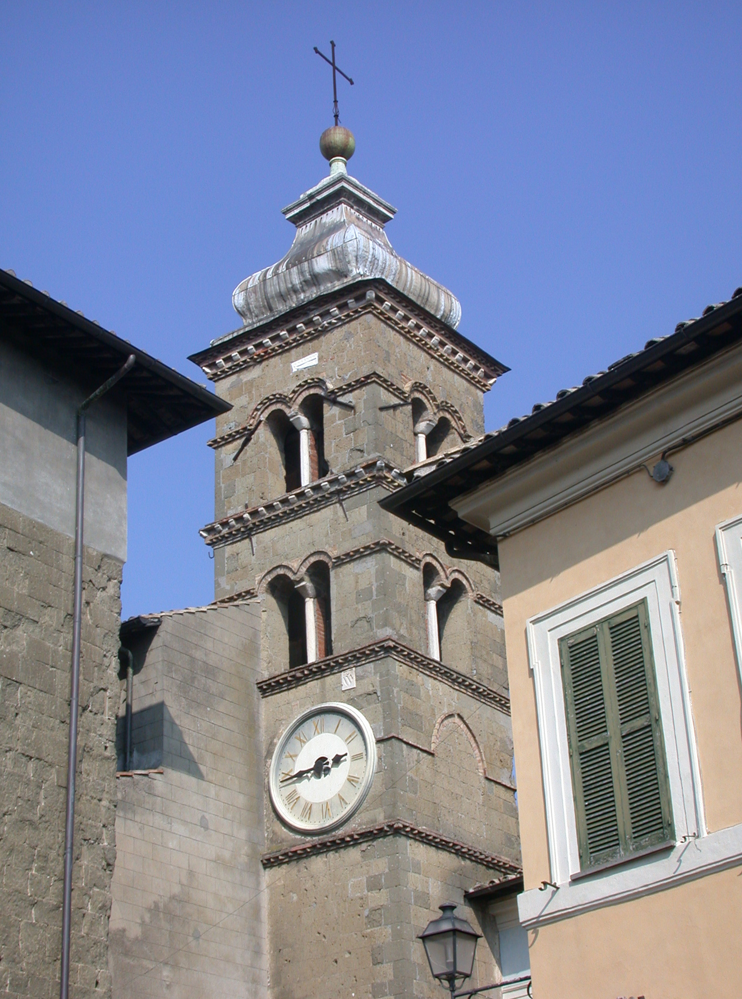 Italia, Regione Lazio, Provincia di Roma, Formello, piazza San Lorenzo, chiesa di San Lorenzo, campanile dalla piazza.